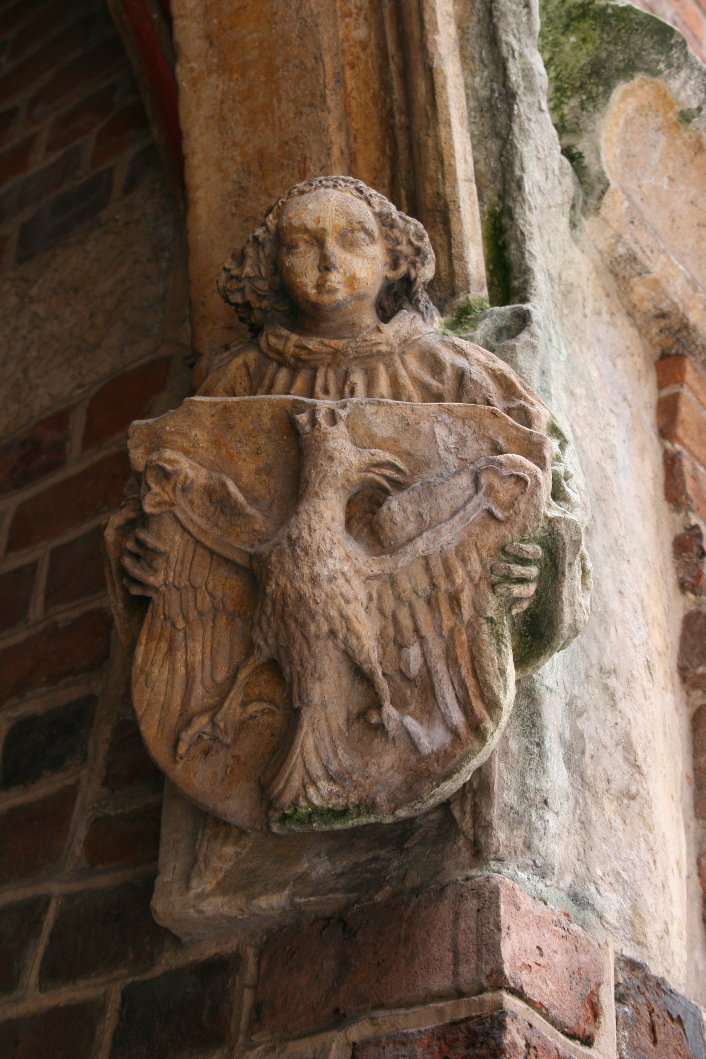 Wspornik sklepienia w Ogrojcu (1488-1518) przy kościele św. Barbary w Krakowie.